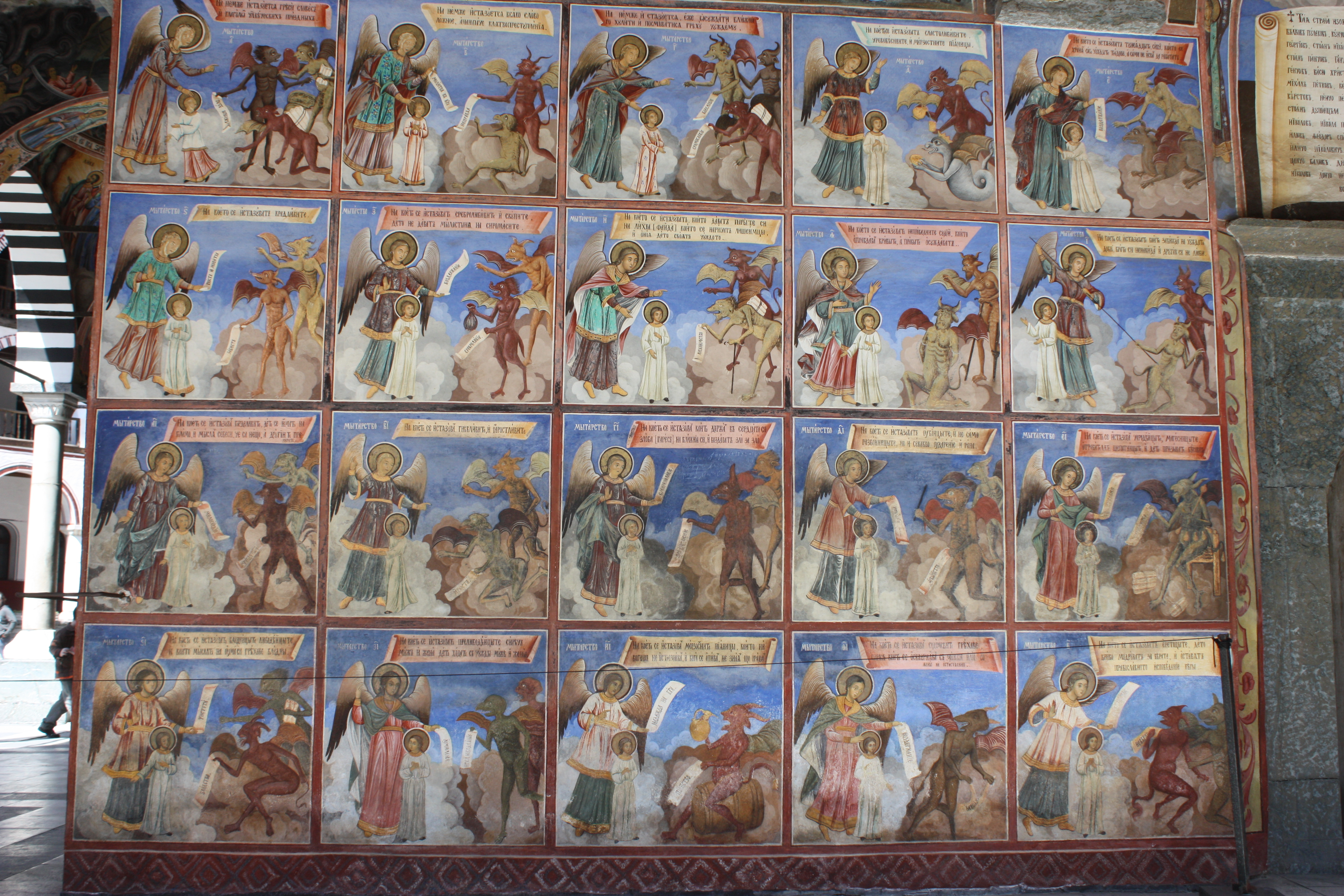 Rila Monastery, Rilakloster, Kloster Rila, Рилски манастир, Bulgaria